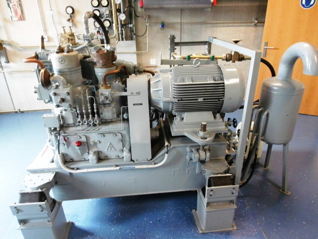 Luftverdichter